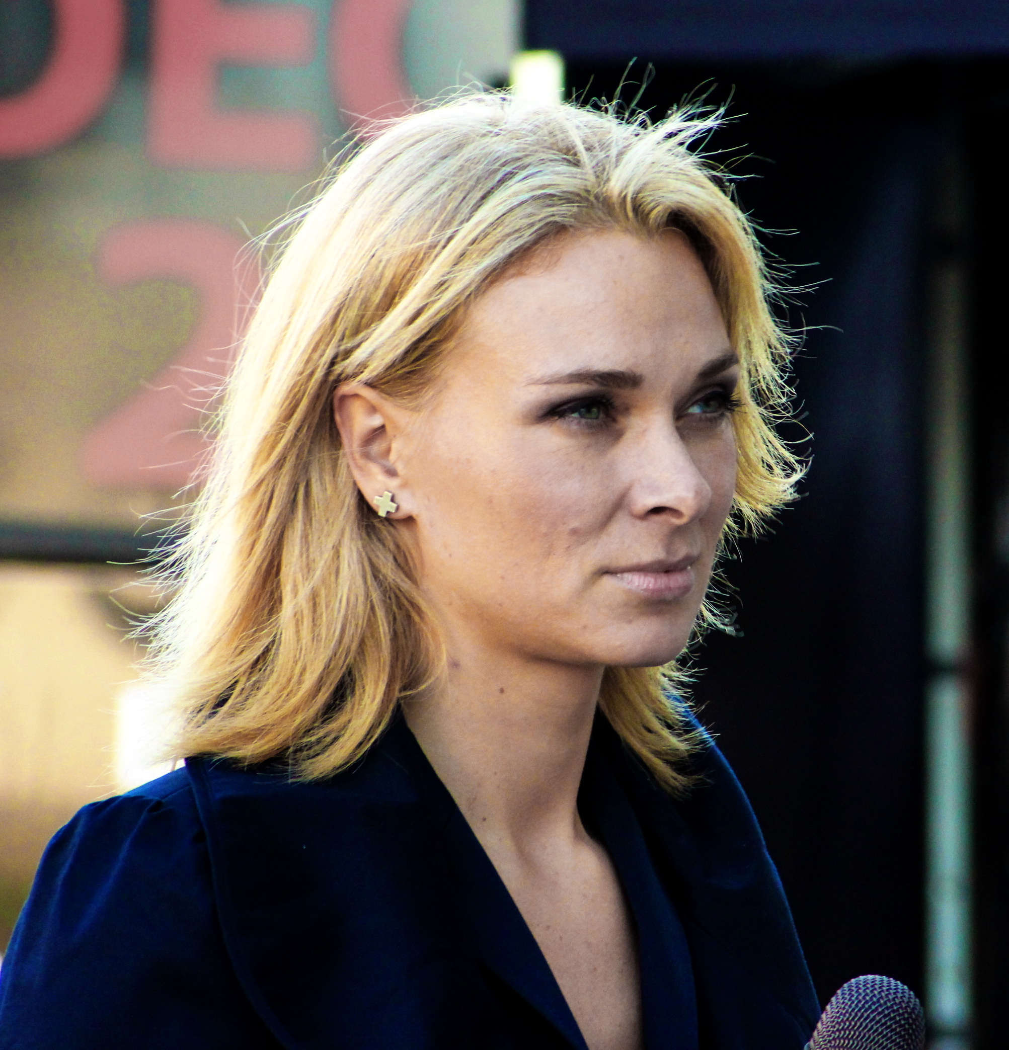 Moderatorin beim Event "5 Jahre BMW Welt"